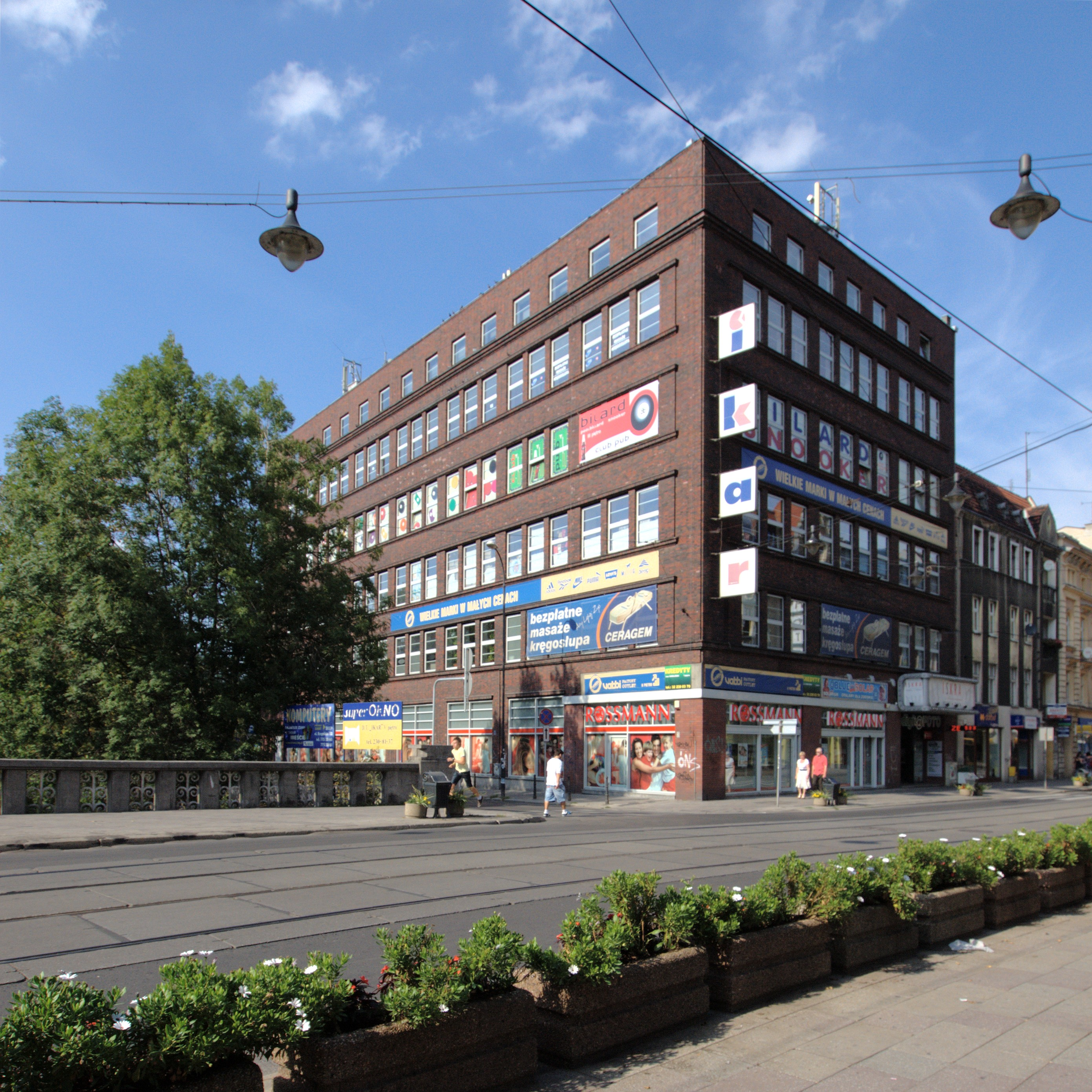 Ulica Zwycięstwa w Gliwicach. Dom towarowy Ikar.